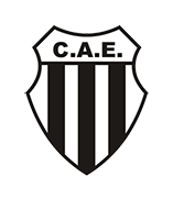 escudo estudiantes (Ba)